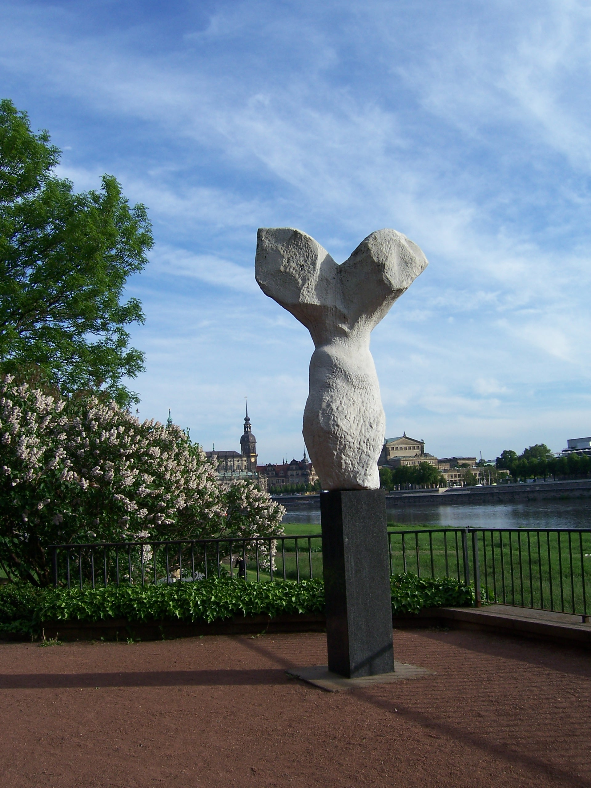 Statues Sich befreien von Charlotte Sommer-Landgraf